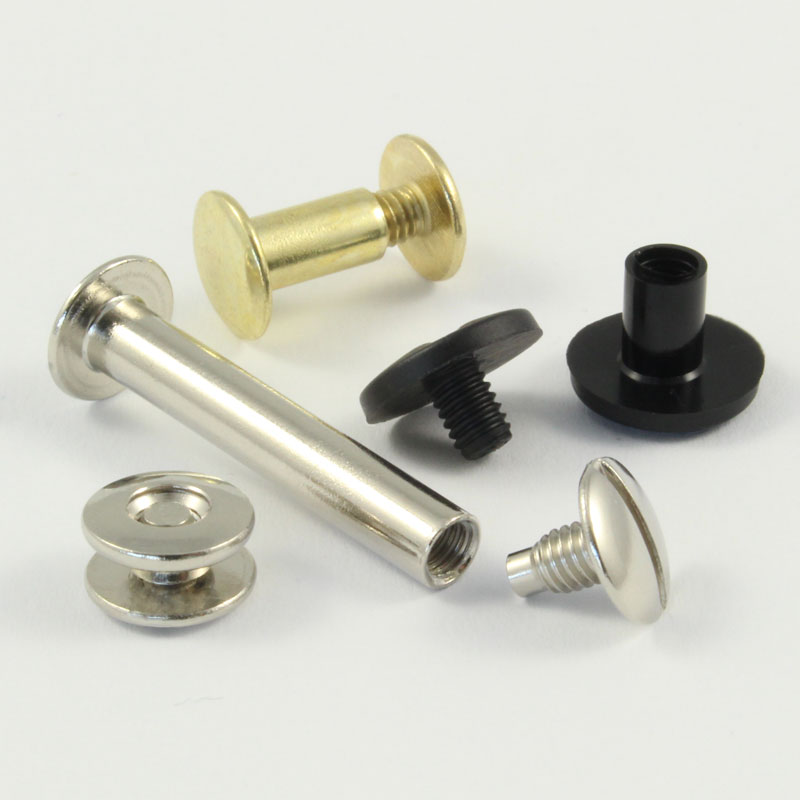 Darstellung von Buchschrauben in unterschiedlichen Variationen